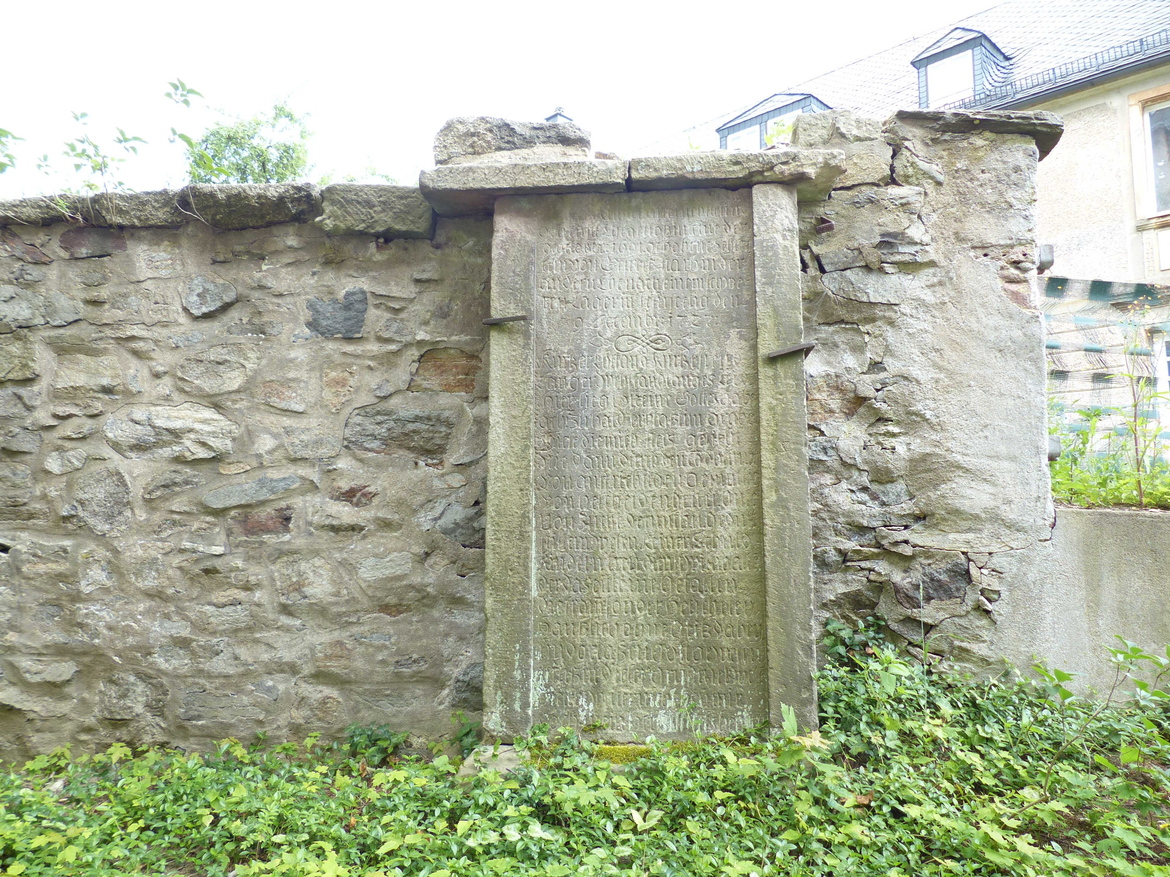 Marienkirche in Stammbach, Ansichten des Außenbereichs